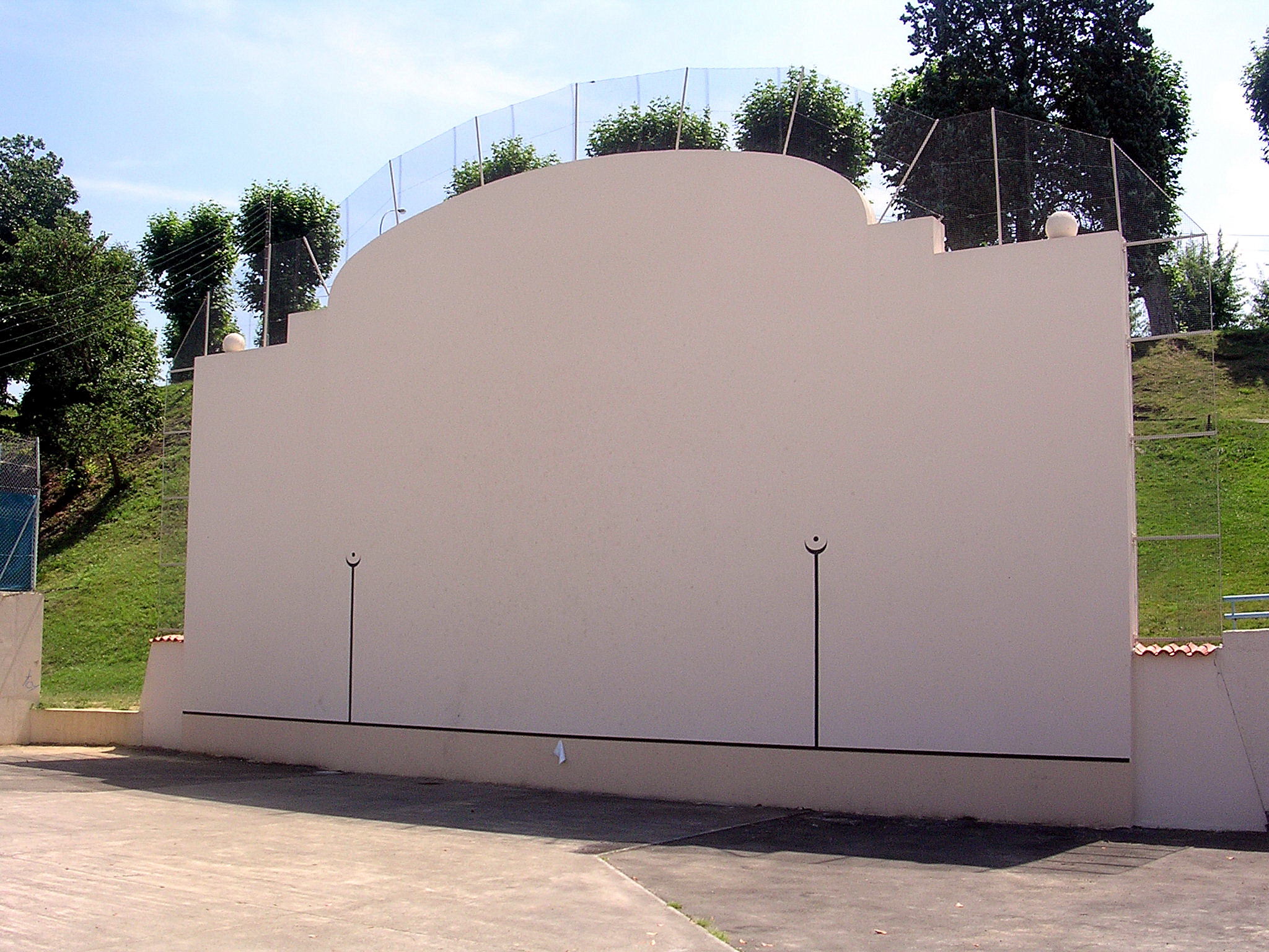 Fronton de Mont-de-Marsan (Landes, France)